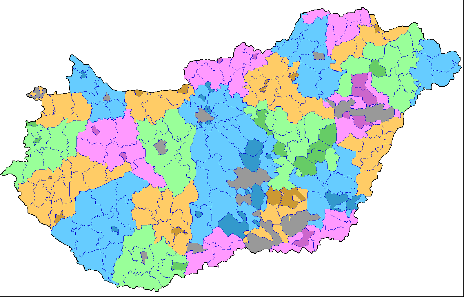 Magyarország közigazgatási beosztása 1936-ban (vármegyék, járások és városok)